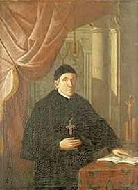 Obraz opata Amanduse Streera ve farním kostele v Městě Touškově.